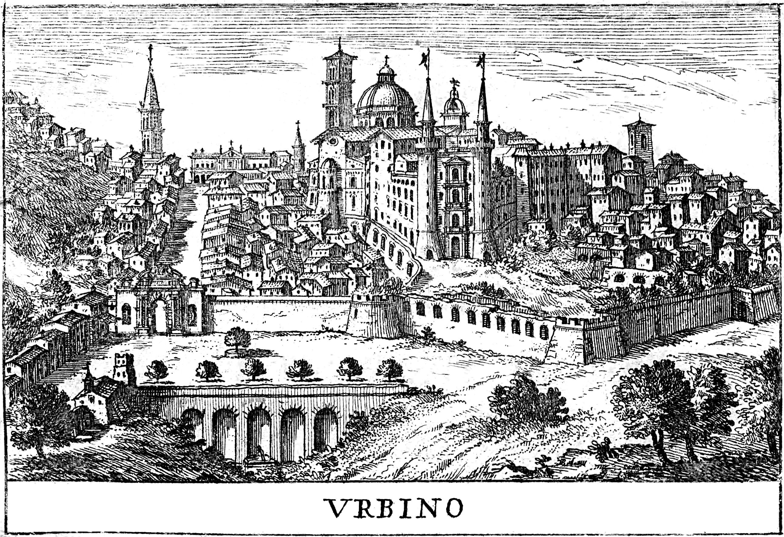 Litografia della città di Urbino tratta dalla copertina del testo Cronica de Matematici di Bernardino Baldi, 1707